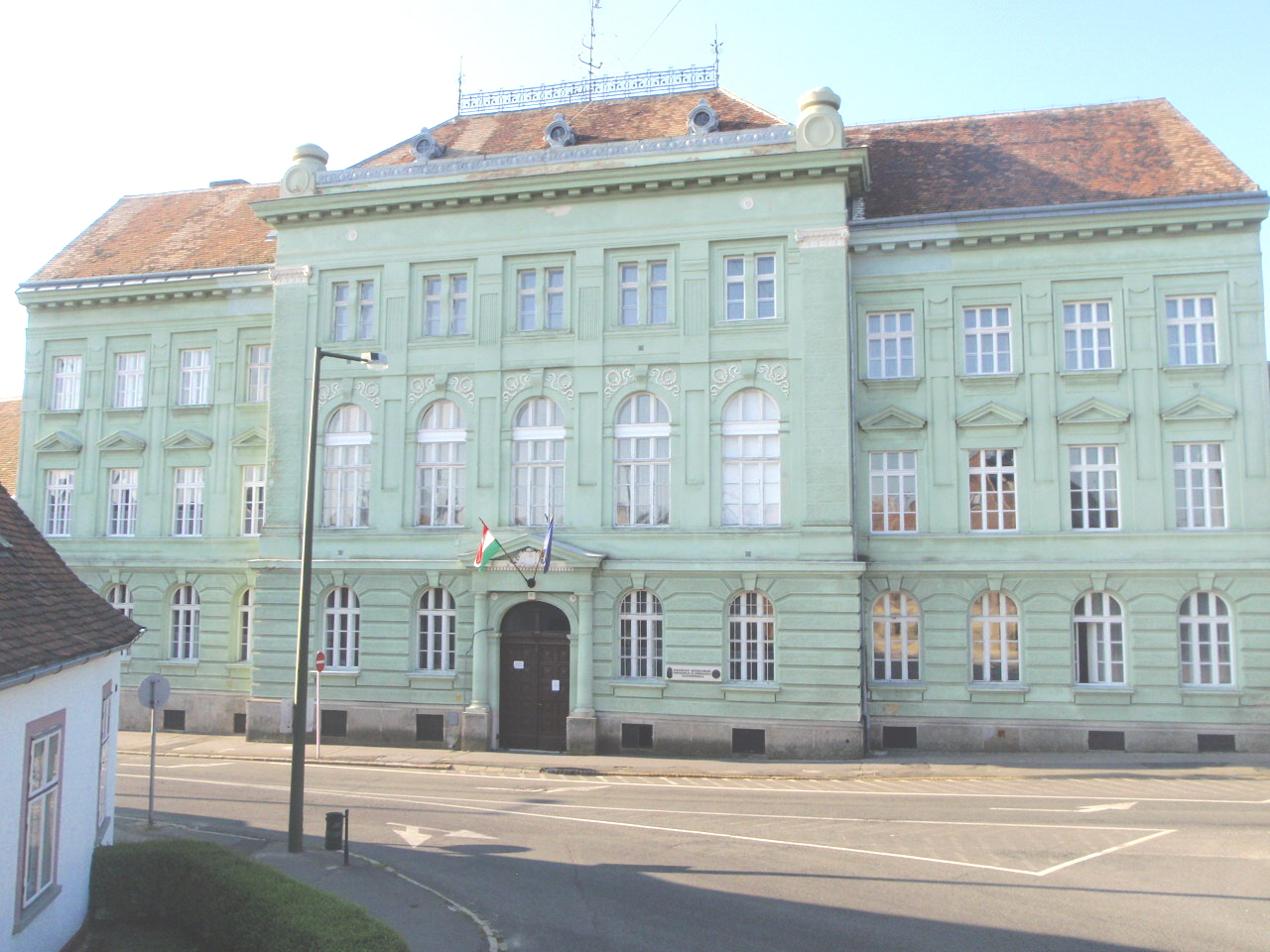 Güns eveangelische Fachschule, Arpad Platz